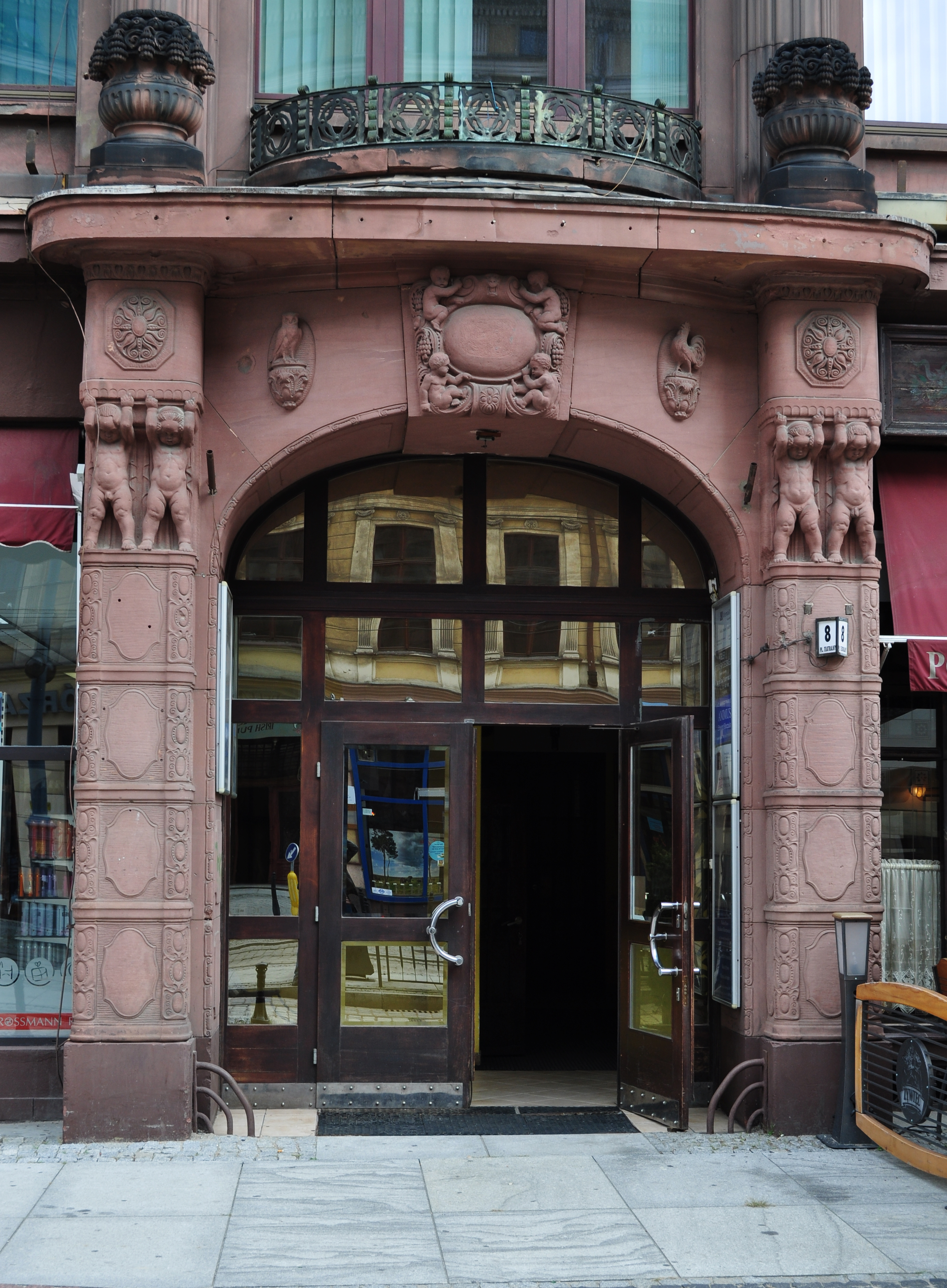 Wrocław Stare Miasto, pl. Teatralny 8 / ul. Świdnicka 34 - dom handlowo-usługowy, dawny dom handlowy Juliusa Schottländera "St. Hieronymus" (zabytek nr A/1378)